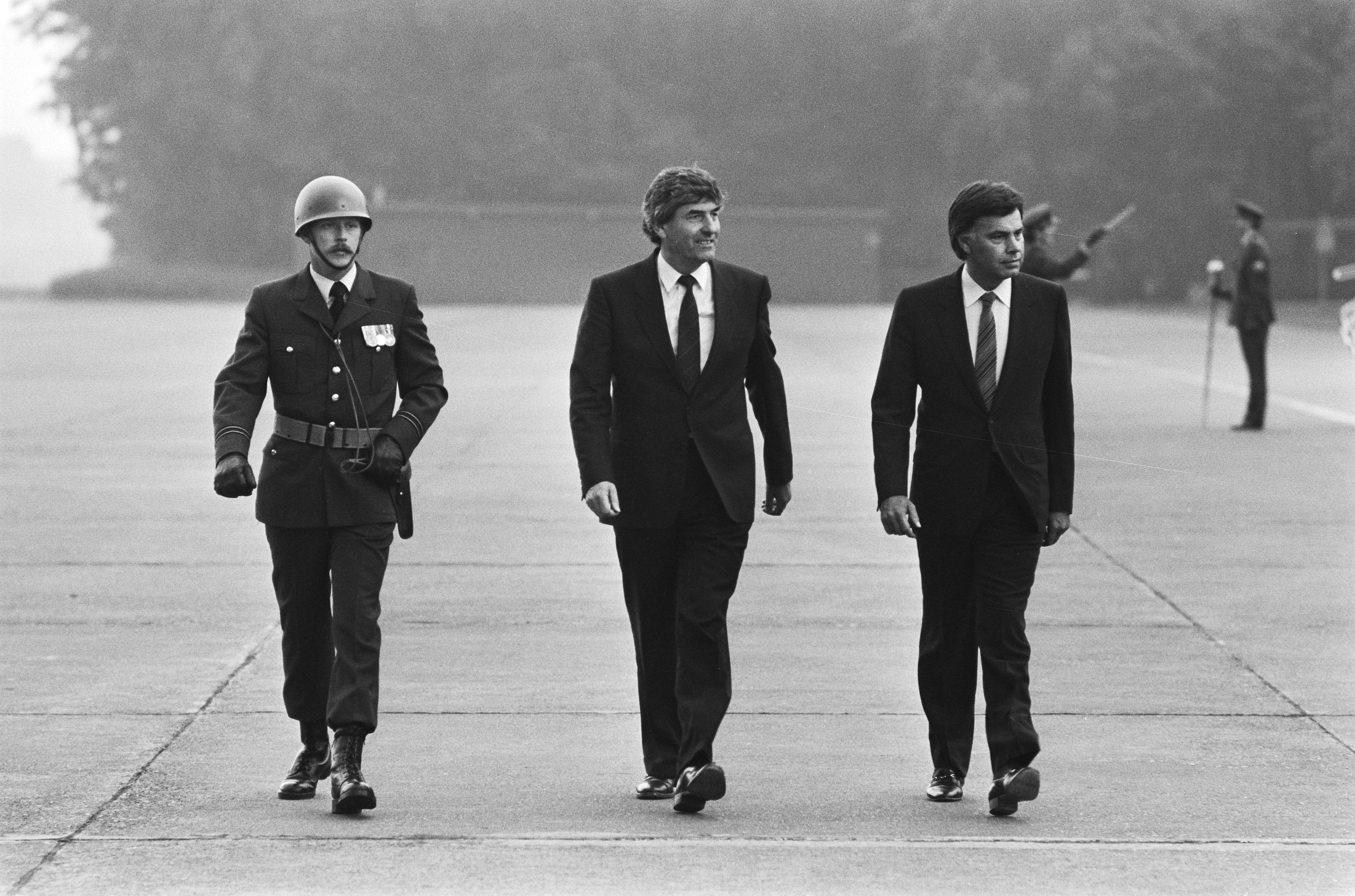 Collectie / Archief : Fotocollectie Anefo Reportage / Serie : [ onbekend ] Beschrijving : Aankomst Spaanse premier Gonzalez op Ypenburg; rechts premier Lubbers Datum : 19 juni 1985 Locatie : Den Haag, Spanje, Ypenburg, Zuid-Holland Trefwoorden : aankomsten, premiers Persoonsnaam : Lubbers, Ruud, Premier Gonzalez Fotograaf : Croes, Rob C. / Anefo Auteursrechthebbende : Nationaal Archief Materiaalsoort : Negatief (zwart/wit) Nummer archiefinventaris : bekijk toegang 2.24.01.05 Bestanddeelnummer : 933-3594